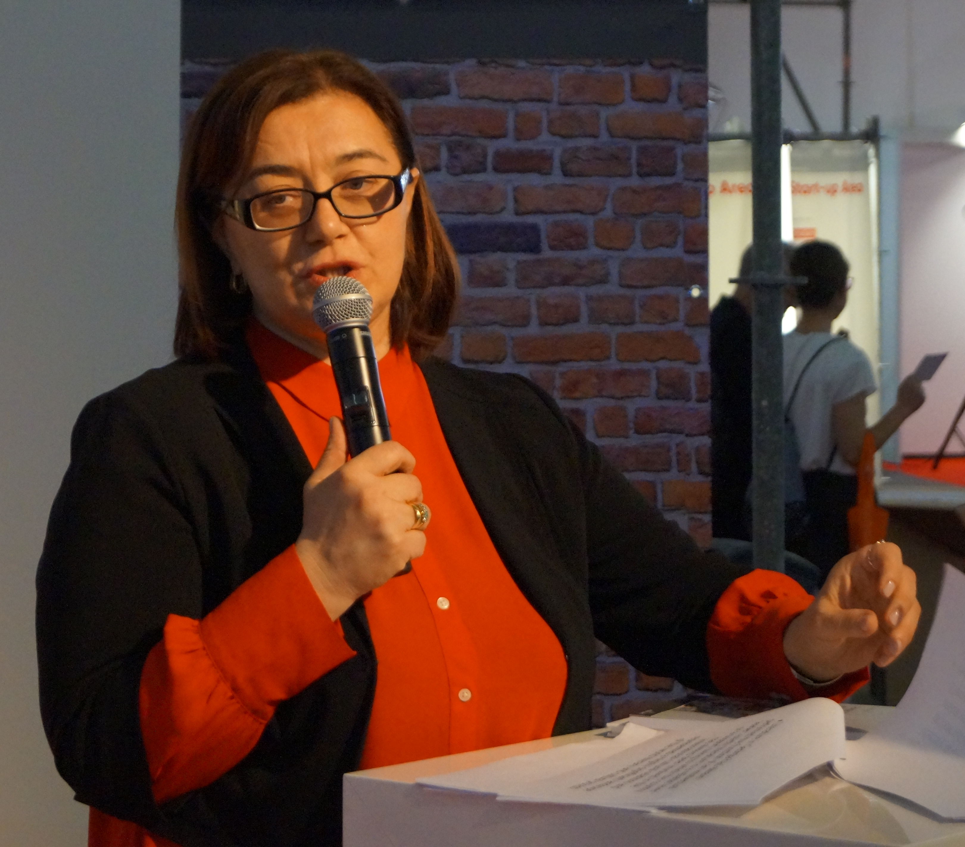 Frankfurter Buchmesse 2018